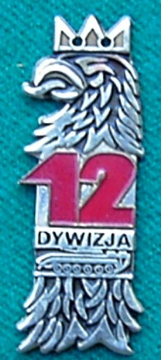 Odznaka 12 Dywizji Zmechanizowanej ze Szczecina